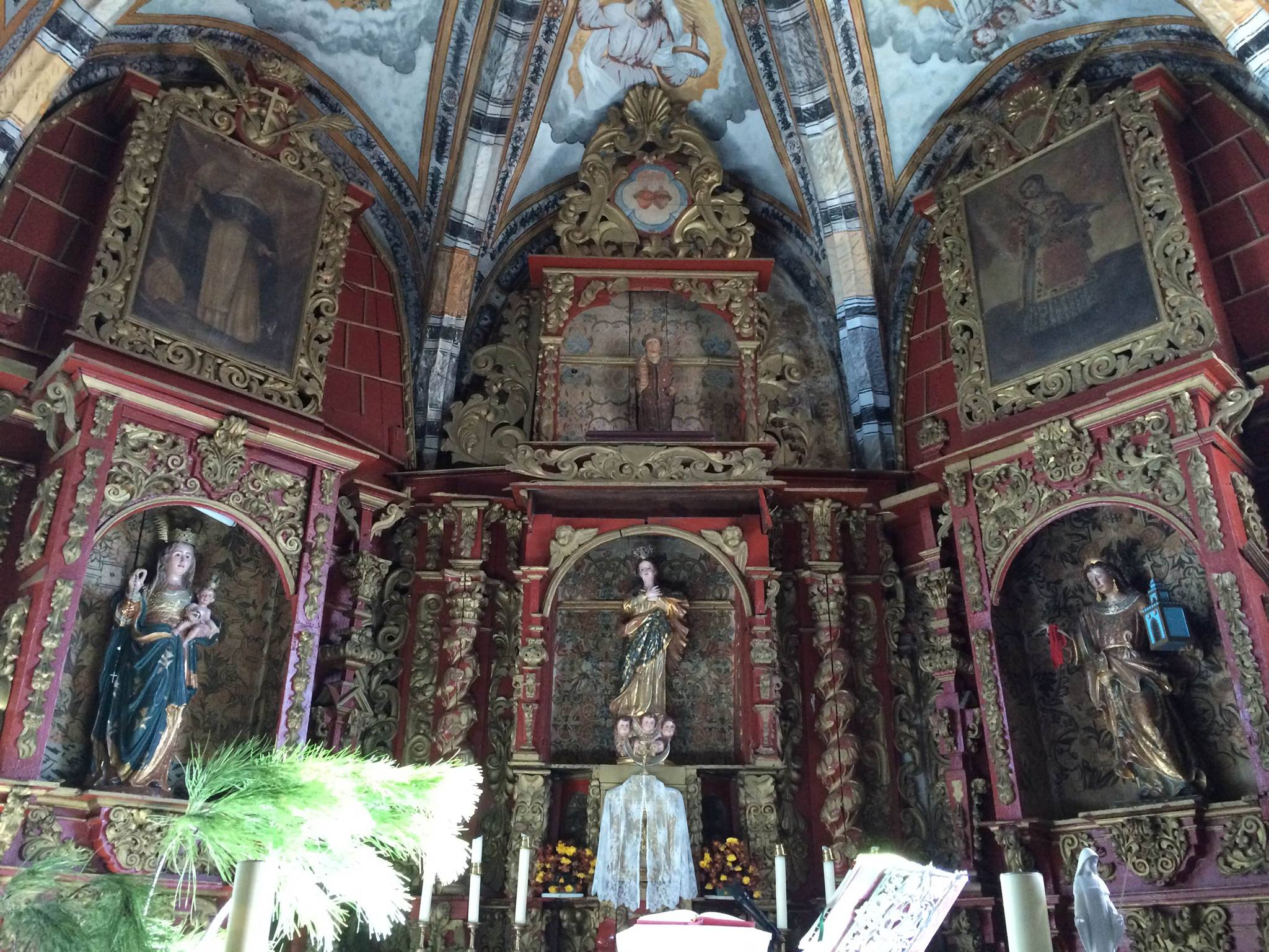 Retablo mayor barroco de la Iglesia Parroquial de la Inmaculada Concepción.